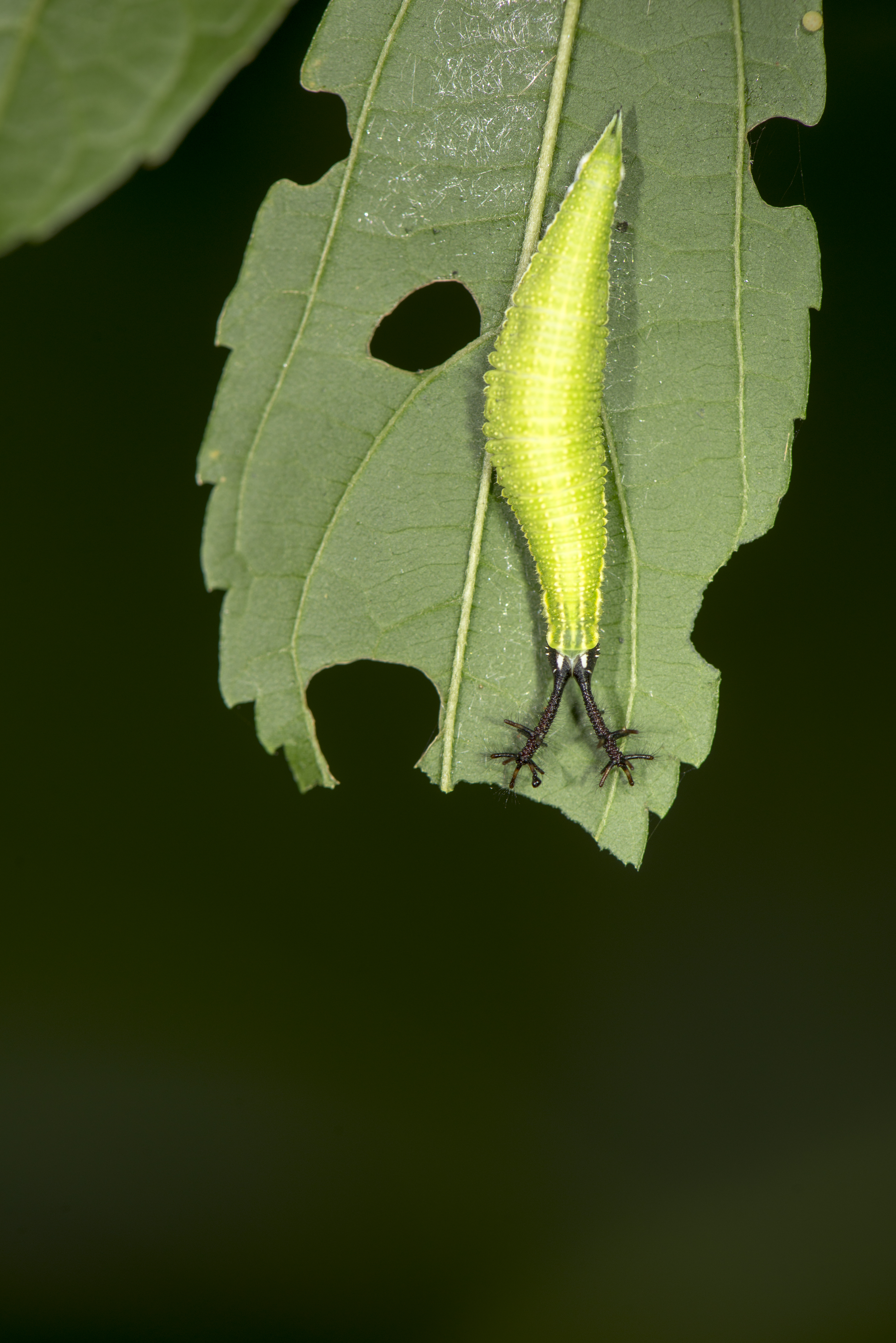 _ESH1856 Timelaea albescens formosana